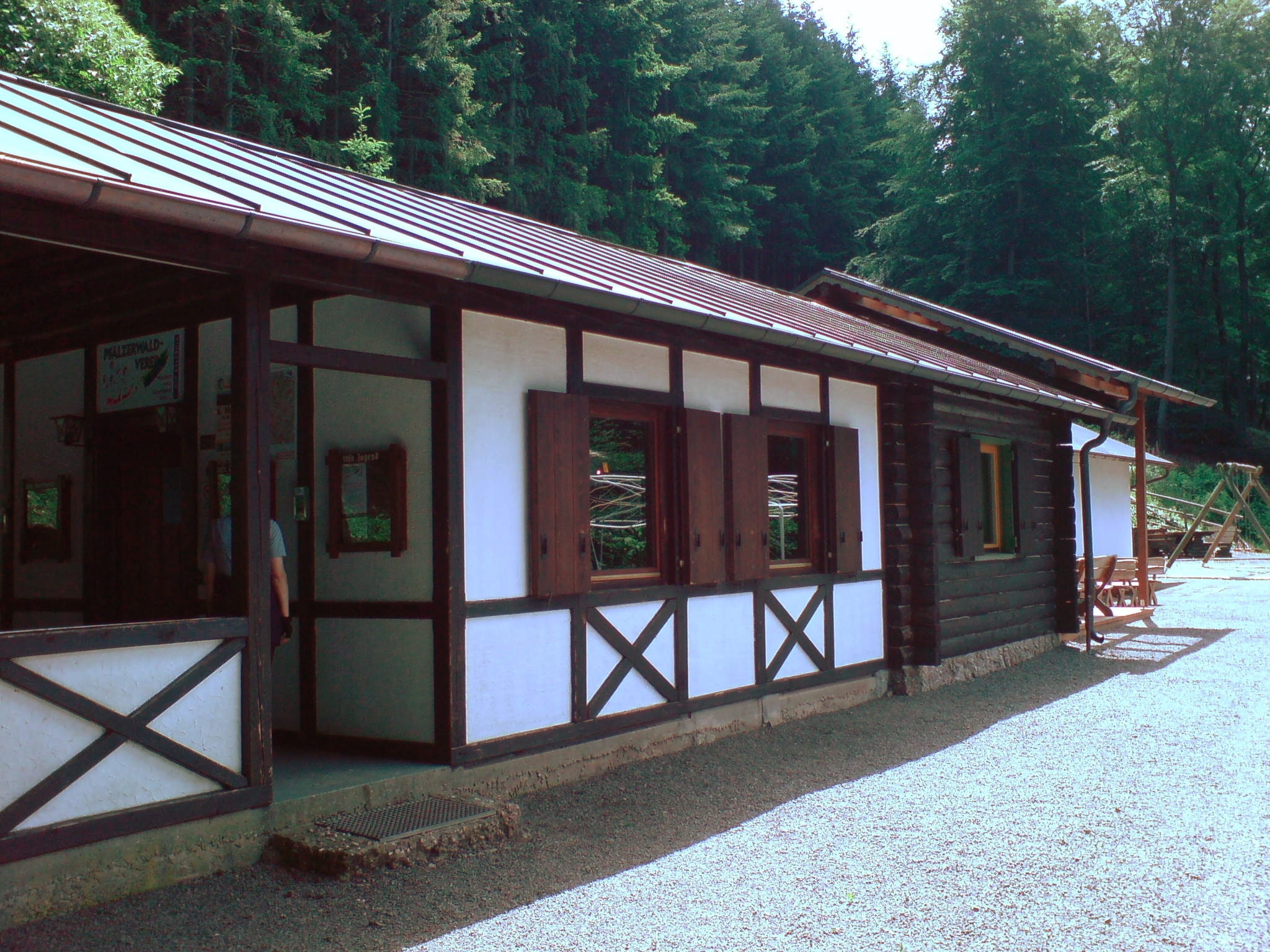 Buchwaldhütte Theisbergstegen